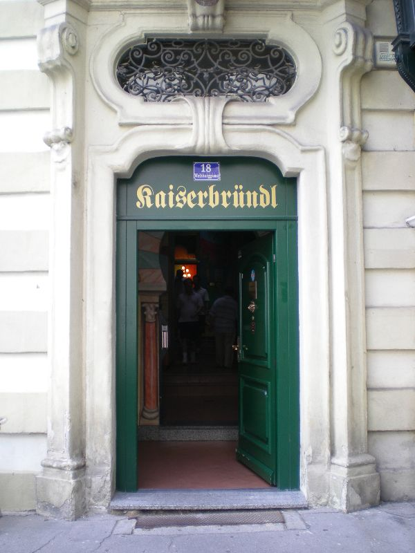 Das ehemalige Zentralbad, heute Kaiserbründl in der Weihburggasse im 1. Wiener Gemeindebezirk - Eingang